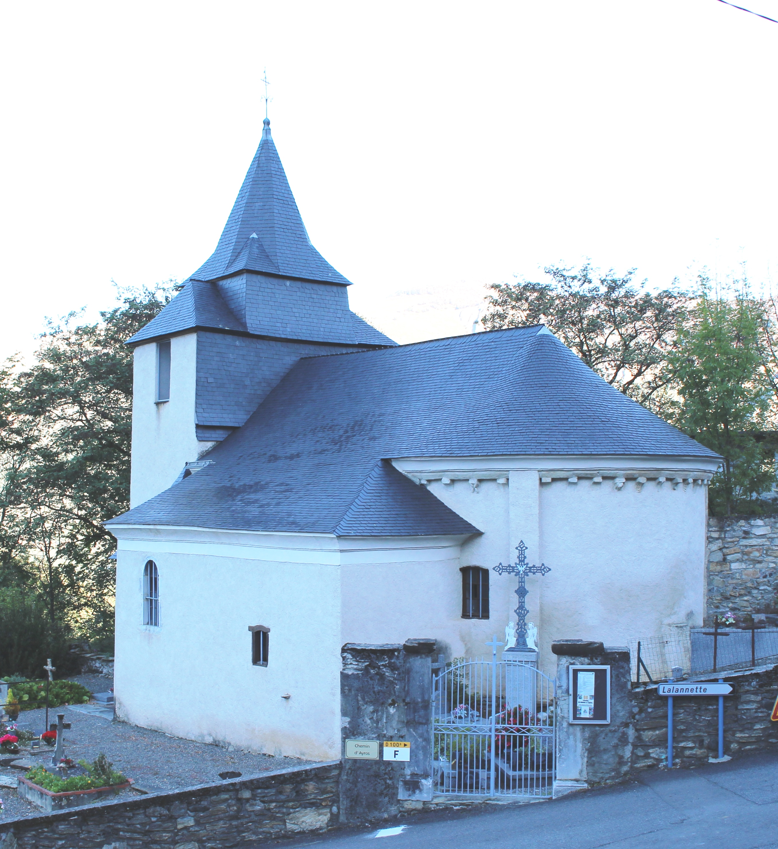 Église de l'Assomption de Saint-Pastous (Hautes-Pyrénées)